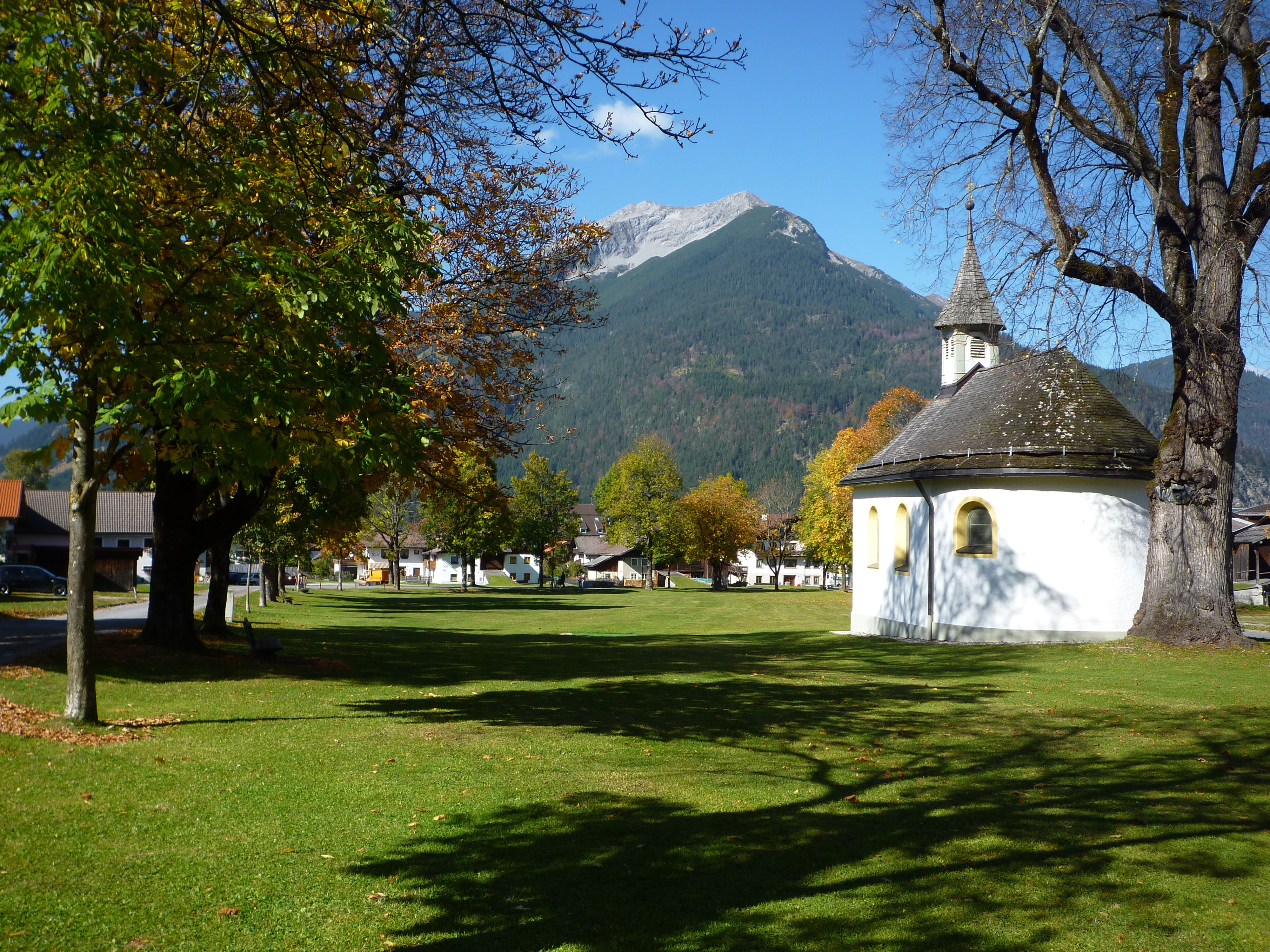 Ehrwald - Daniel mit Martinskapelle 16. Jh